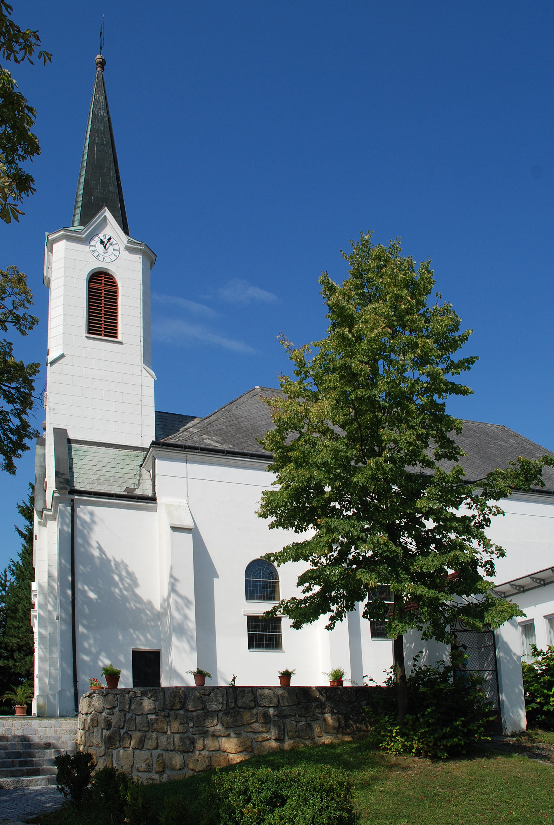 Sigleß, Burgenland, Österreich: Pfarrkirche